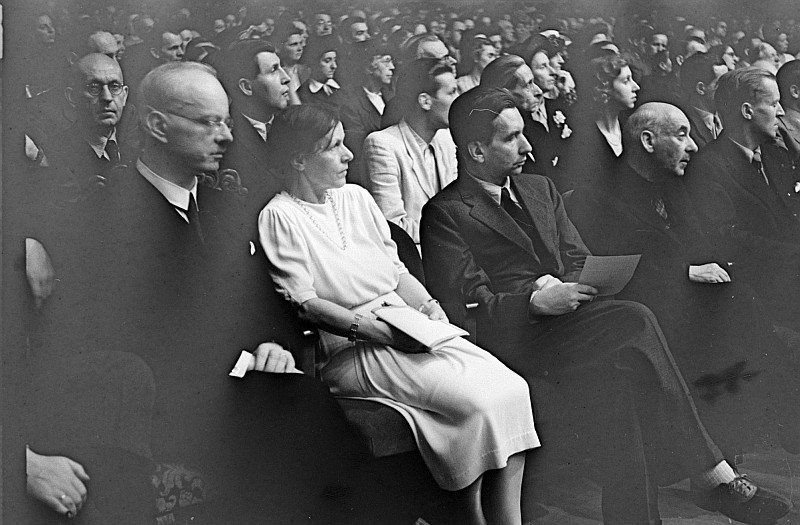 Original image description from the Deutsche Fotothek Porträts: Prof. [Max ?] Pechstein, Johannes Stroux, Kraus, Benedik, Lederer, Theodor Plivier, Prof. Victor Klemperer und Klaus Gysi